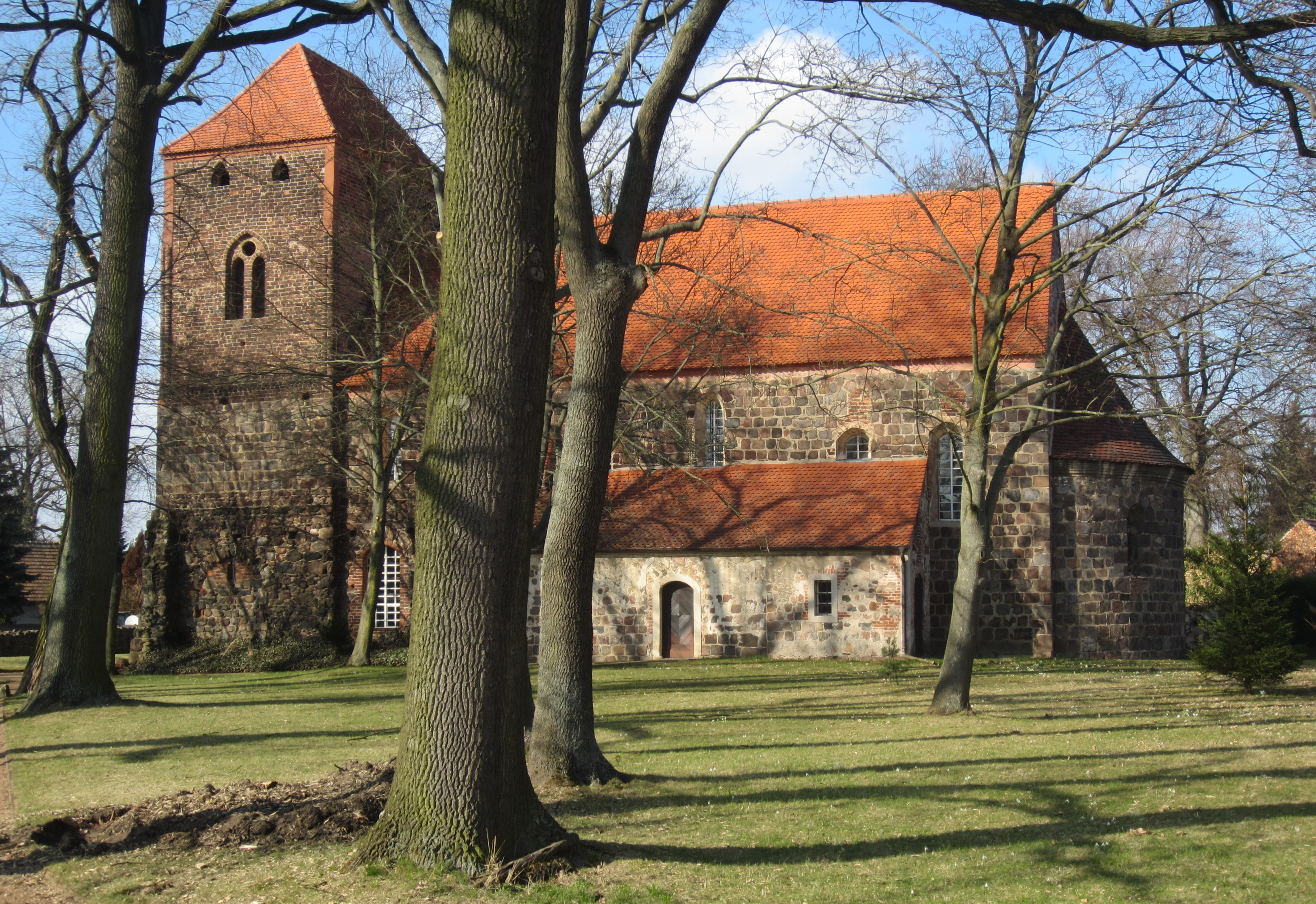 Massen, Gemeinde Massen-Niederlausitz, denkmalgeschützte Dorfkirche, Ansicht von Süden